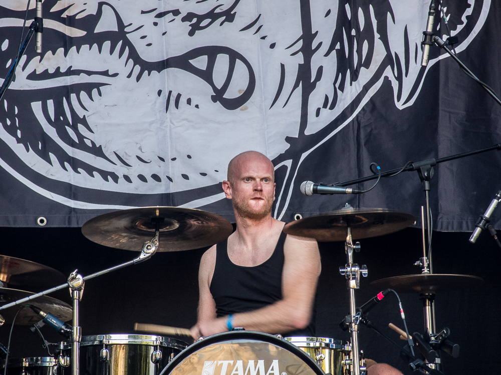 The Idiots auf dem Turock Open Air in Essen am 21.08.2015.